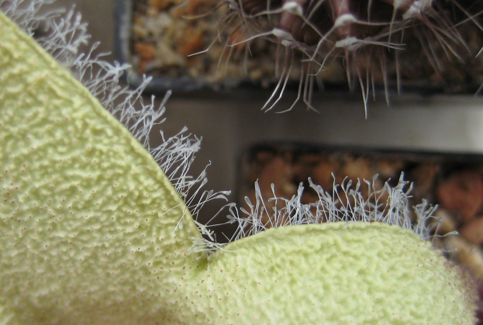 Orbea ciliata in Kultur, Detail des Blütenrandes